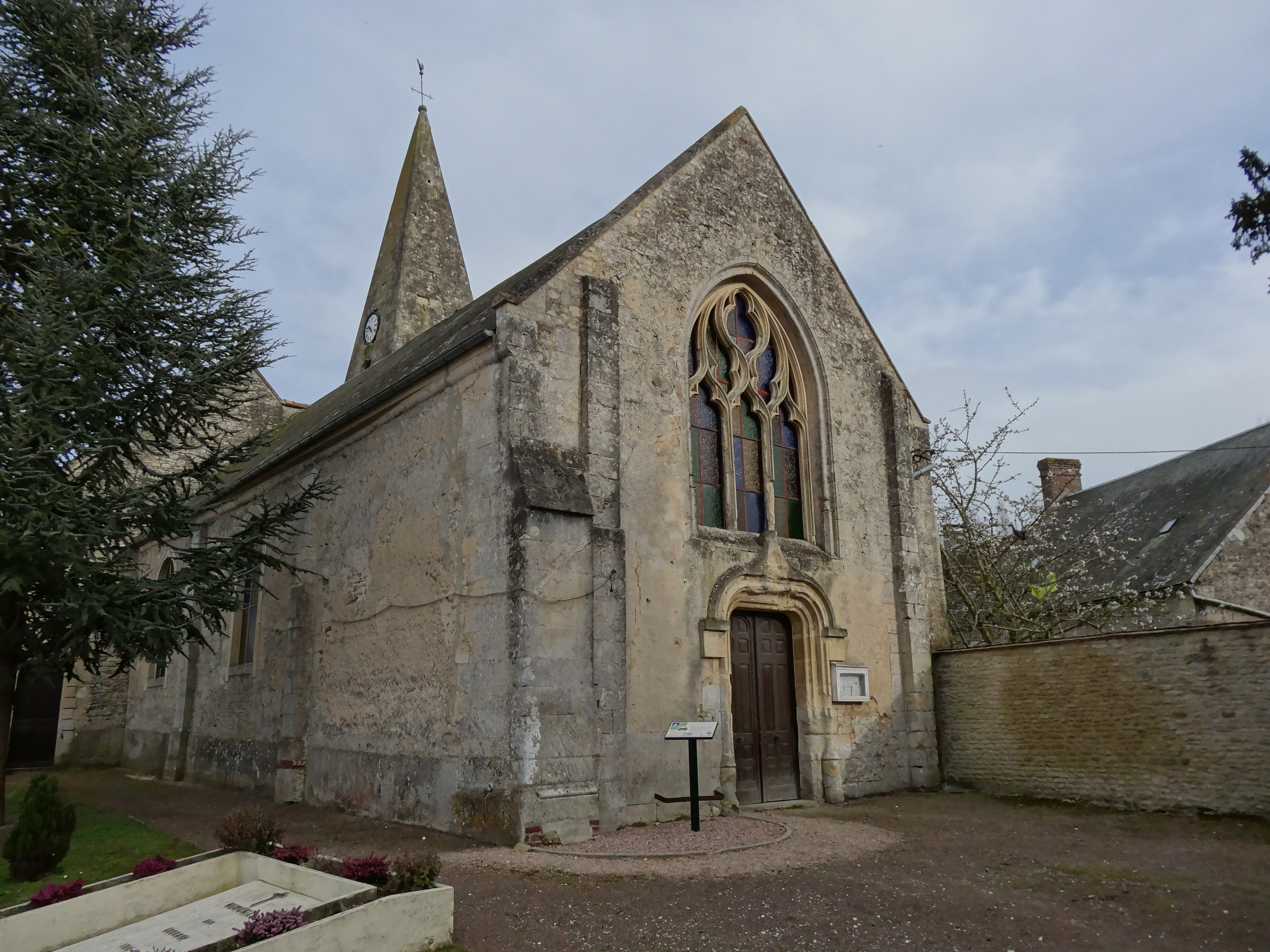 l'église de Damblainville a été en partie construite au XIe siècle, Les murs de la nef révèlent des traces d'appareil en arête-de-poisson sous le crépi